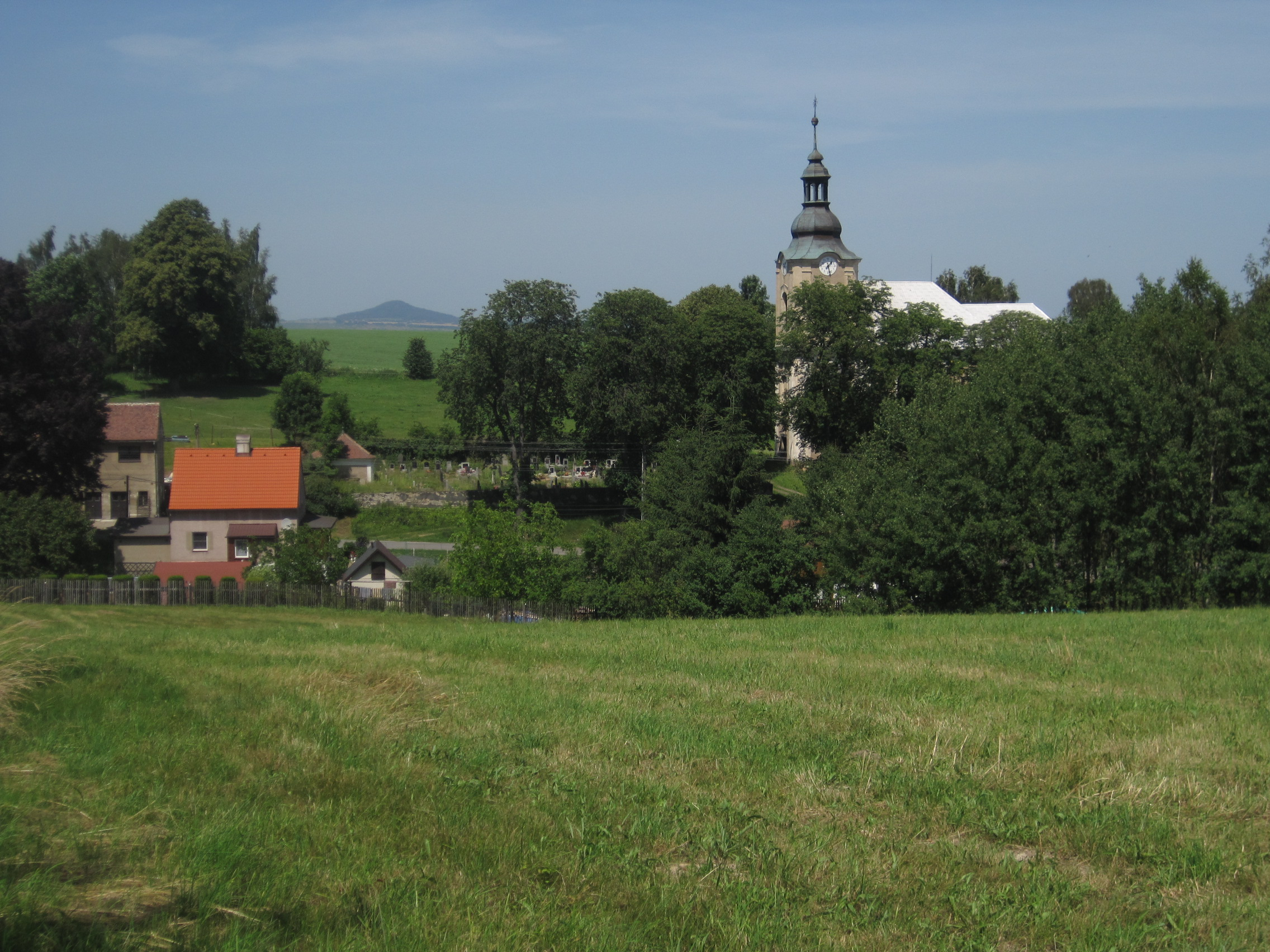 Kostel svaté Anny, střed vsi, Andělka (Višňová).